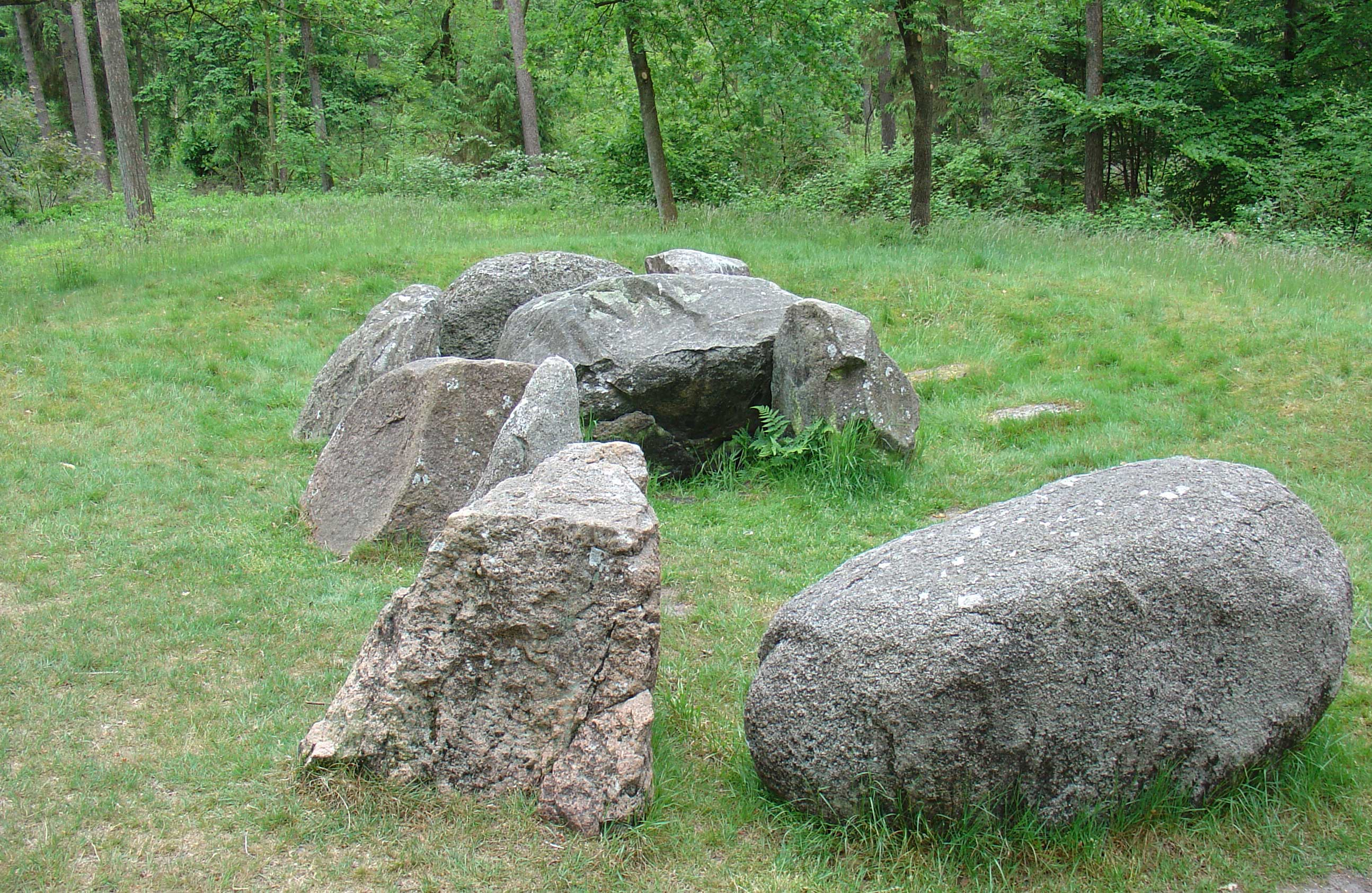 Hunebed D31 tussen Exloo en Valthe